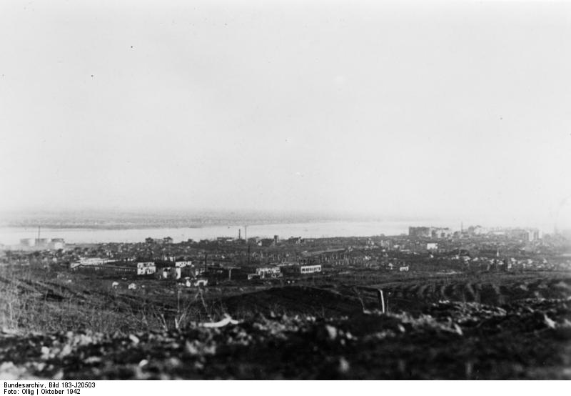 Russland, Kampf um Stalingrad, Zerstörungen An der Sowjetfront: Das nördliche Stalingrad.- Blick auf das heiß umkämpfte nördliche Stalingrad, in dem die großen Werke liegen, die trotz heftigsten Widerstandes eines nach dem anderen fallen. PK-Aufnahme: Kriegsberichter Ollig (sch) 6204-42 "Fr.f.D.OKW" Oktober 1942 [Herausgabedatum] [Sowjetunion.- Schlacht um Stalingrad]